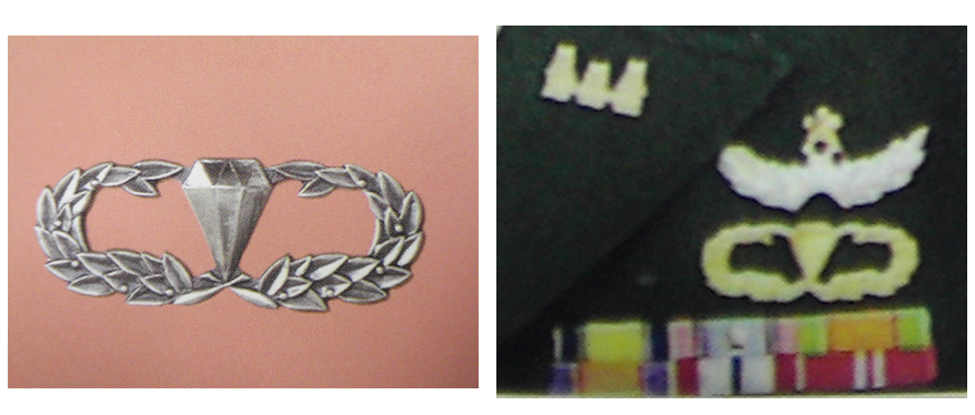 陸上自衛隊レンジャー徽章 写真左が曹士用、写真右は幹部レンジャー